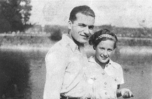 Jura Soyfer und Marika (Maria) Szécsi.